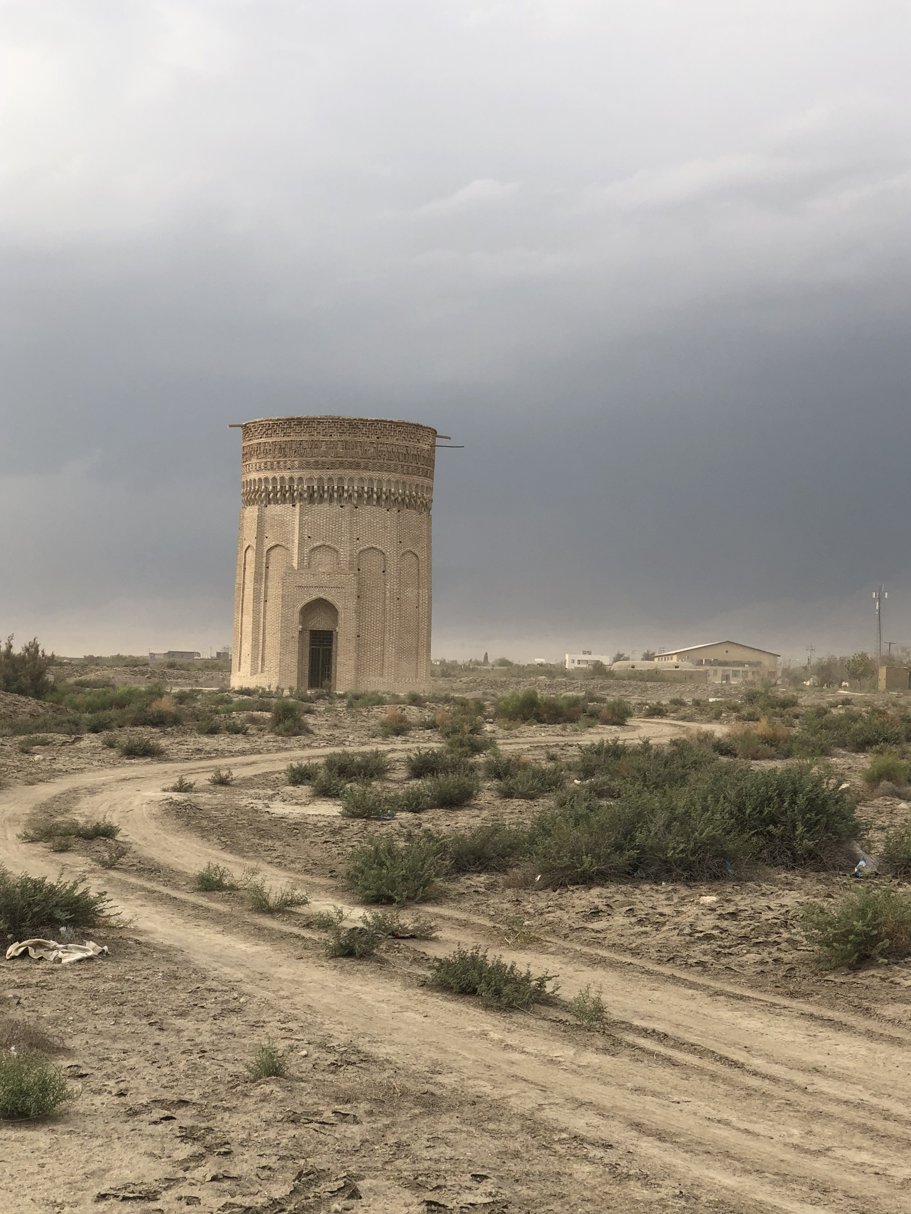 امام آباد ، مهماندوست,(برج طغرل دامغان،(معصوم زاده